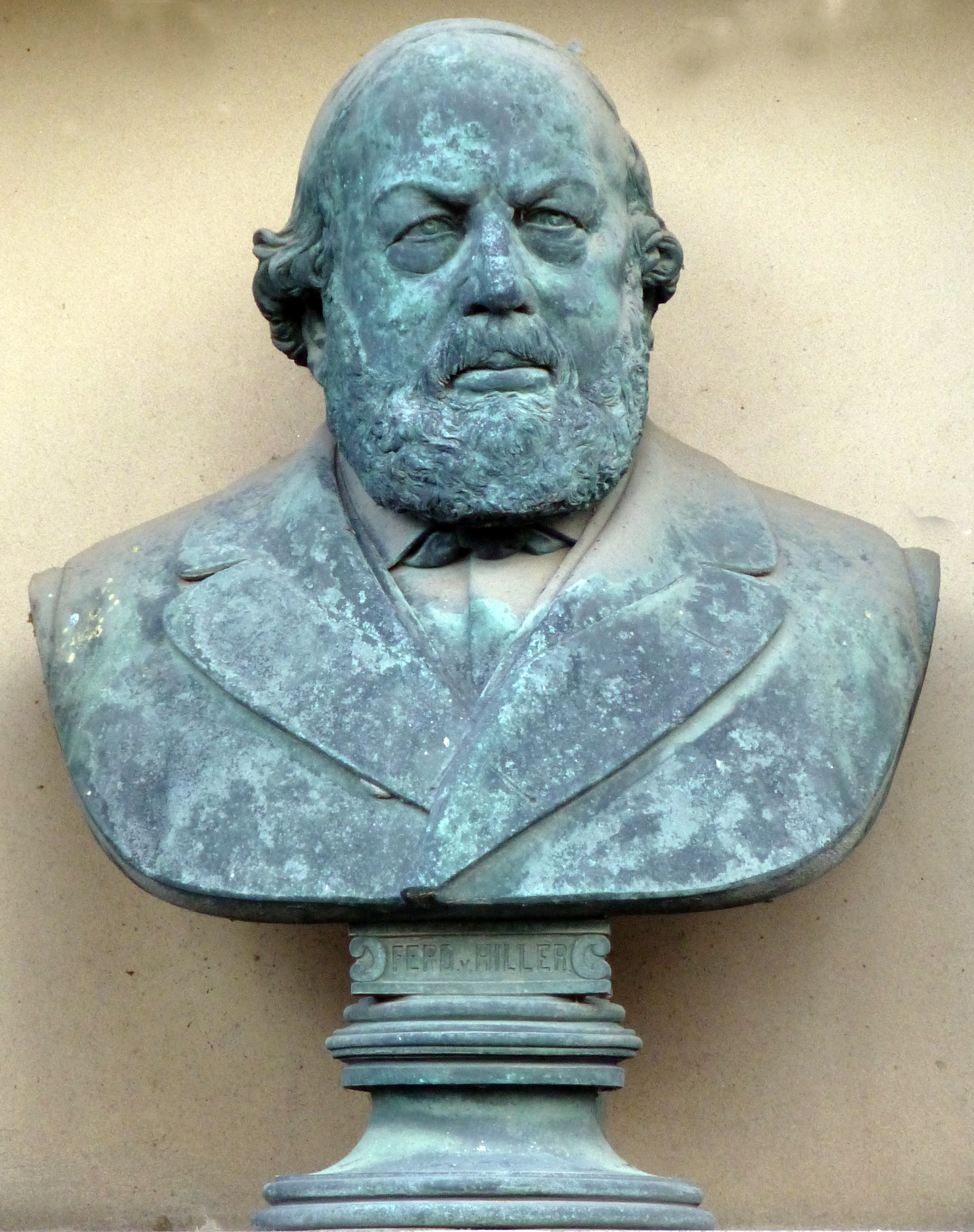 Büste am Grabmal von Ferdinand Hiller; Büste von Anton Werres auf dem Kölner Melaten-Friedhof. Künstler: Anton Werres (1830–1900) DescriptionGerman artist deutscher BildhauerDate of birth/death1 January 183027 April 1900Location of birth/deathCologneCologneWork locationCologne, RomAuthority control : Q15729050 VIAF: 81616740 ULAN: 500088900 GND: 137423101 This is a photograph of an architectural monument.